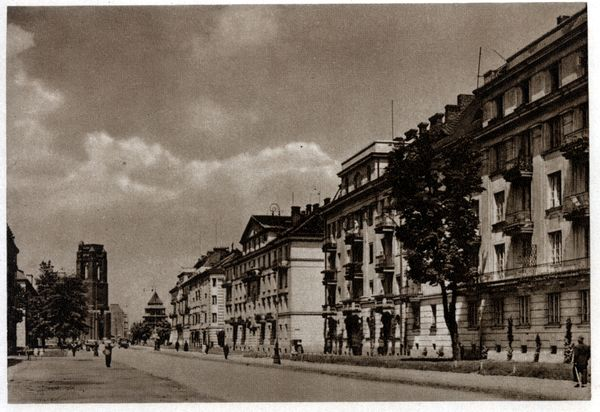 ulica Uniwersytecka w Warszawie, lata '30